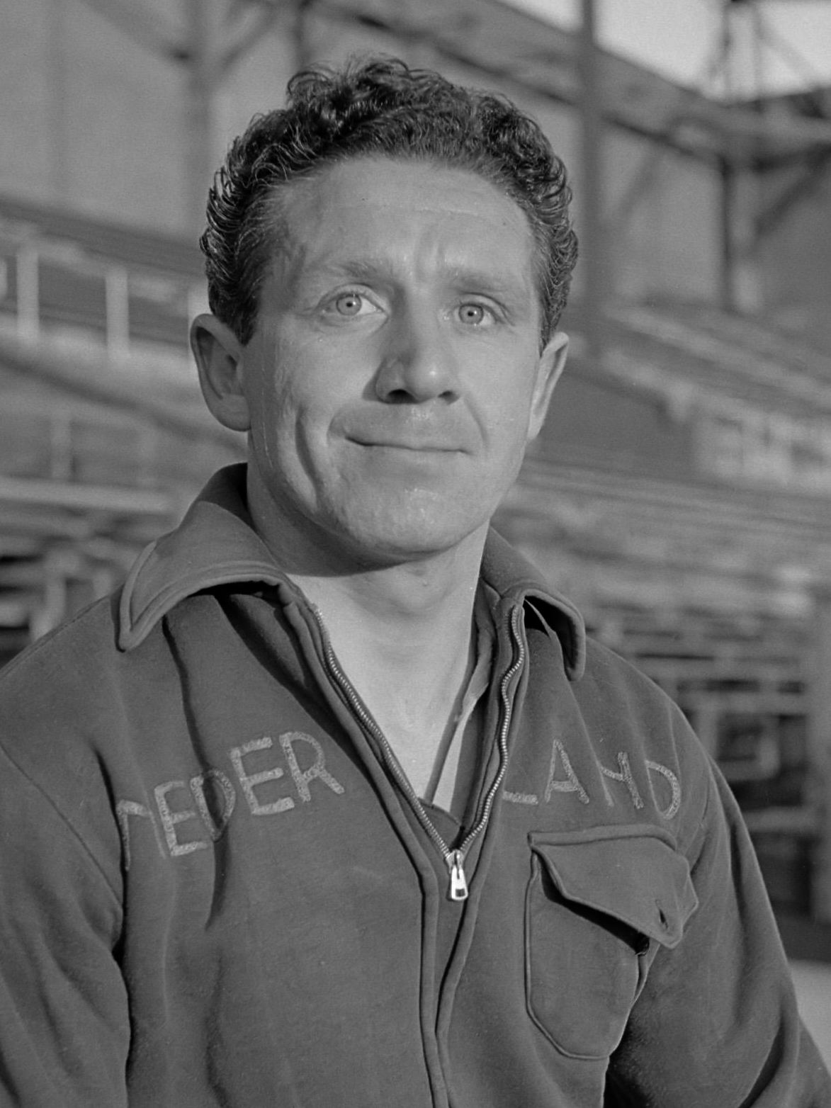 Nederlands voetbalelftal 1951. Aanvoerder Rinus Terlouw (Sparta) in het Olympisch Stadion in Amsterdam, enige dagen na de oefeninterland tegen België.